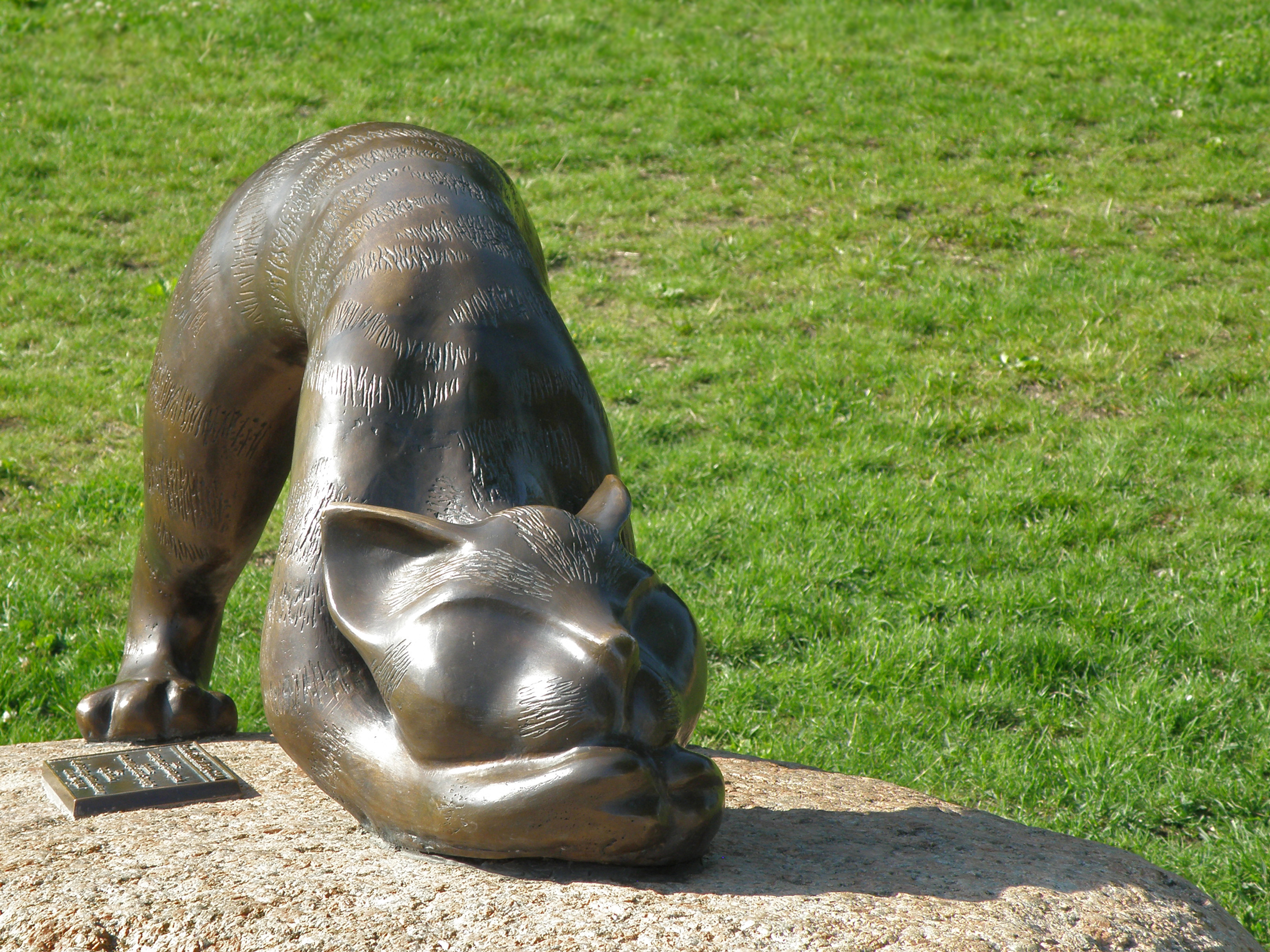 Rzeźba Kota Niezależnego - Park Nad Balatonem - Warszawa, Gocław